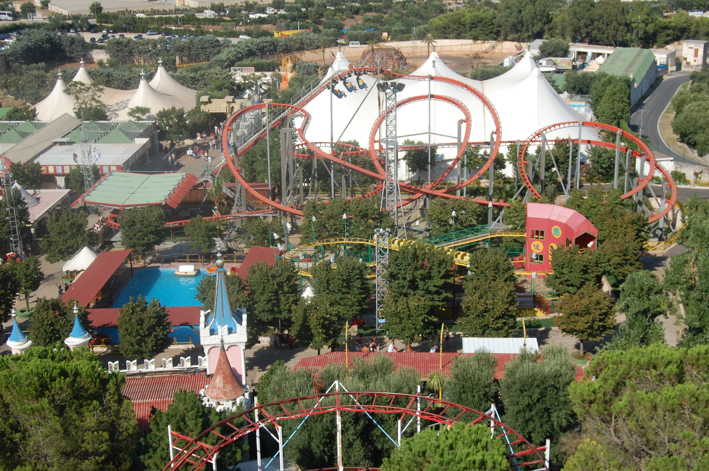 Zoosafari di Fasano (BR). Fasanolandia. vista del parco